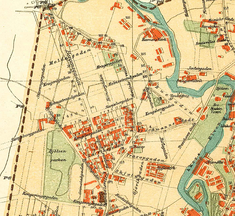 Kart over Bjølsen.